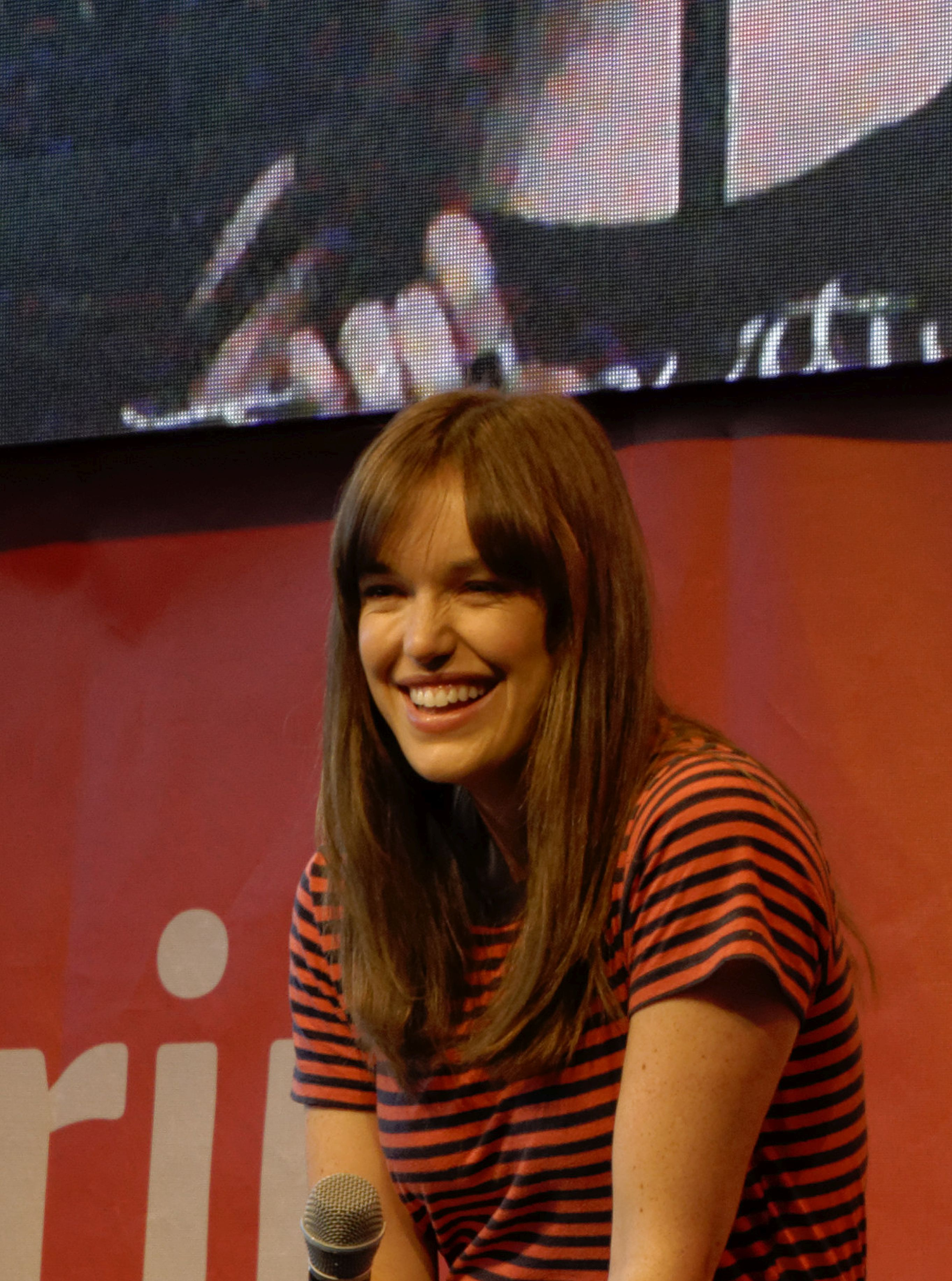 Bilder von der Comic Con Germany in Stuttgart 2018